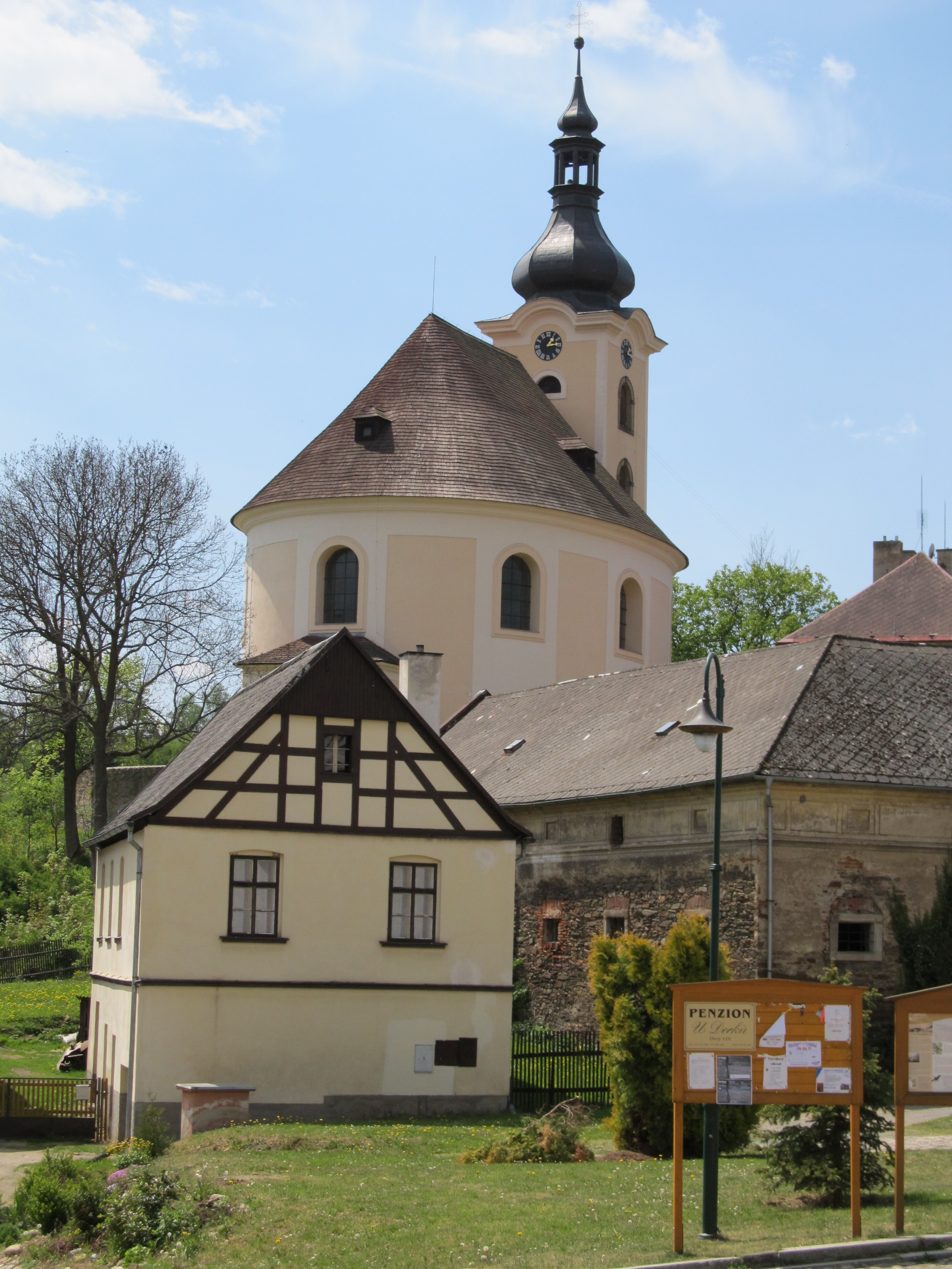 Úterý - kostel sv. Jana Křtitele